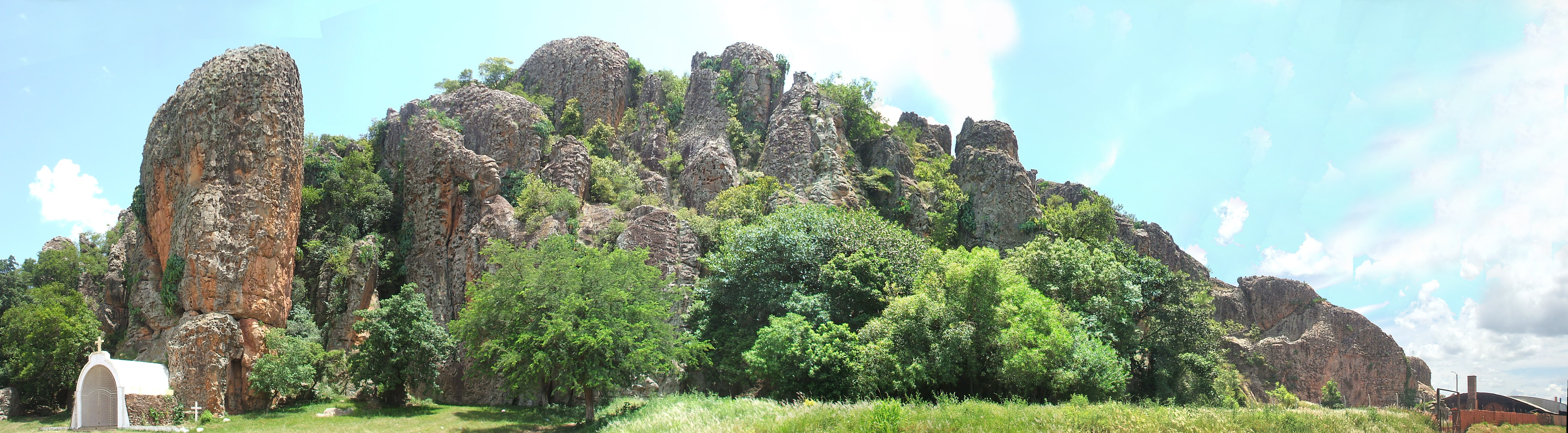 cerro